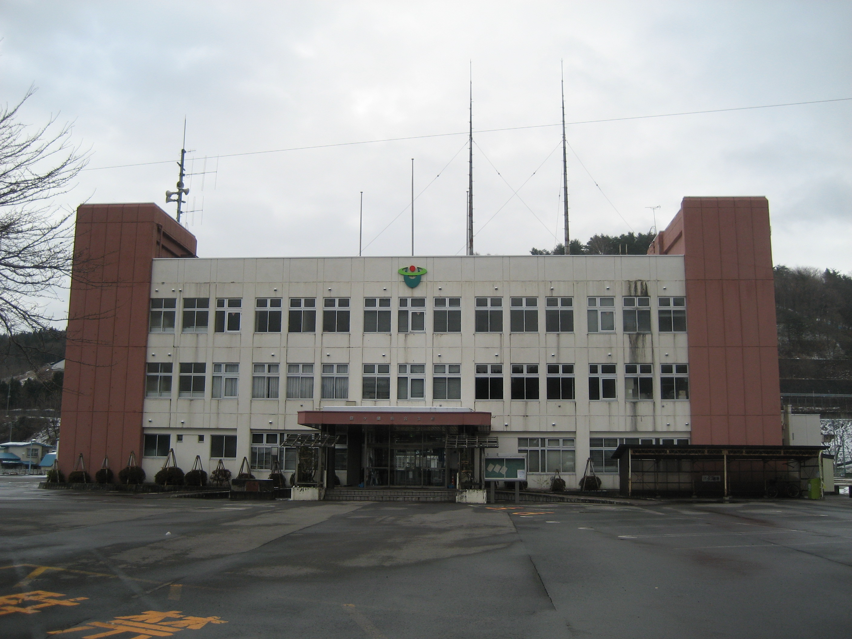 青森県にある平川市役所碇ヶ関総合支所庁舎（旧碇ヶ関村役場）